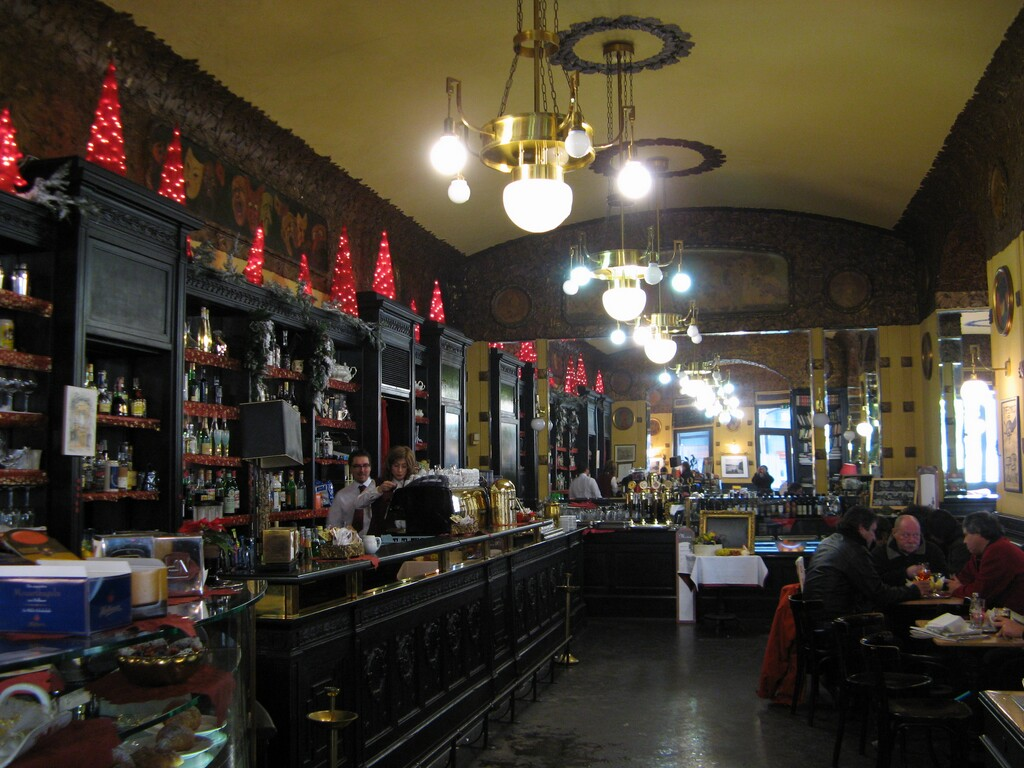 Interno del Caffè San Marco a Trieste